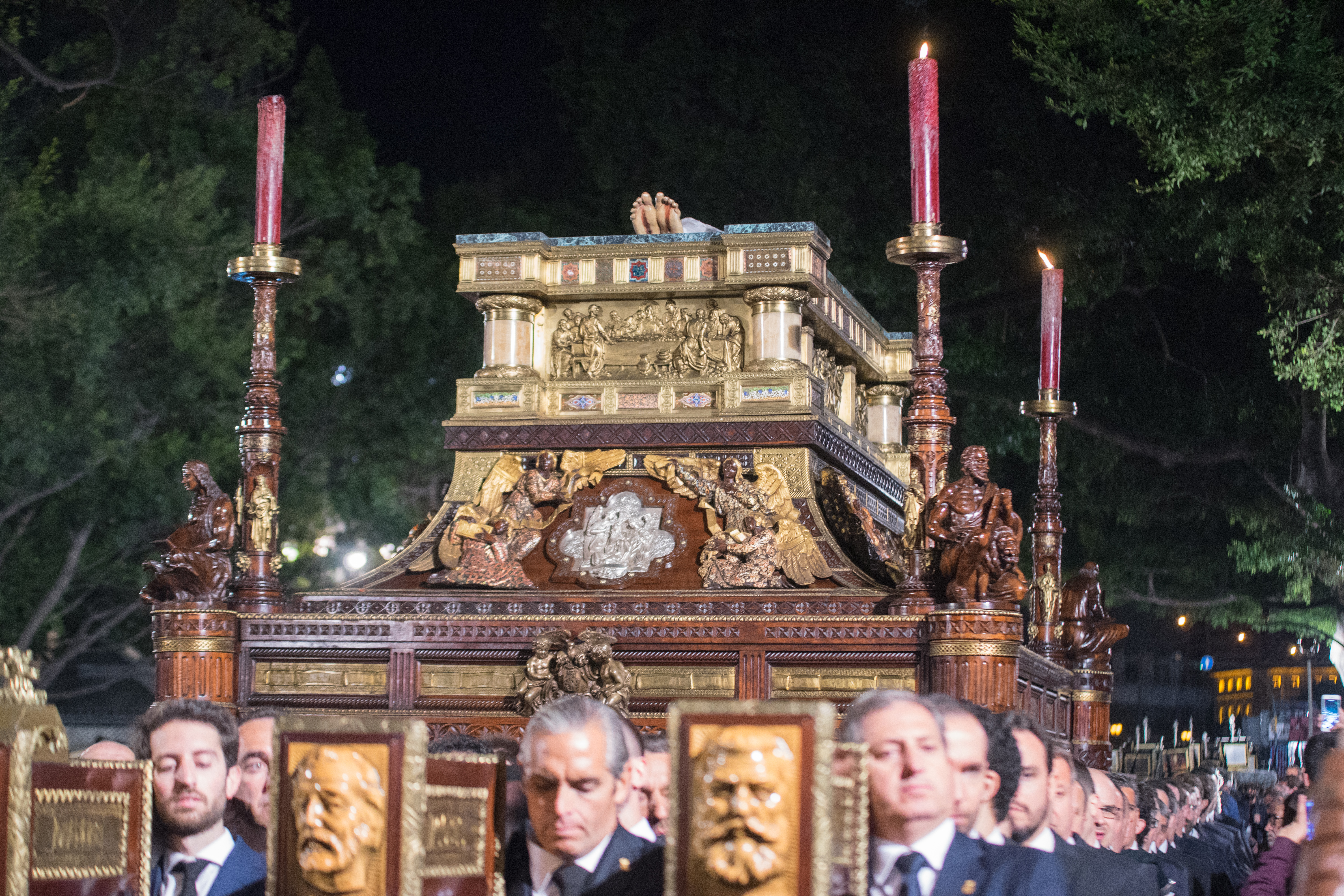 Trono del Sepulcro de la Real Hermandad de Nuestro Padre Jesús del Santo Sepulcro y Nuestra Señora de la Soledad This is a photography of a Folklore festival in Spain (Wikidata id Q9075883).